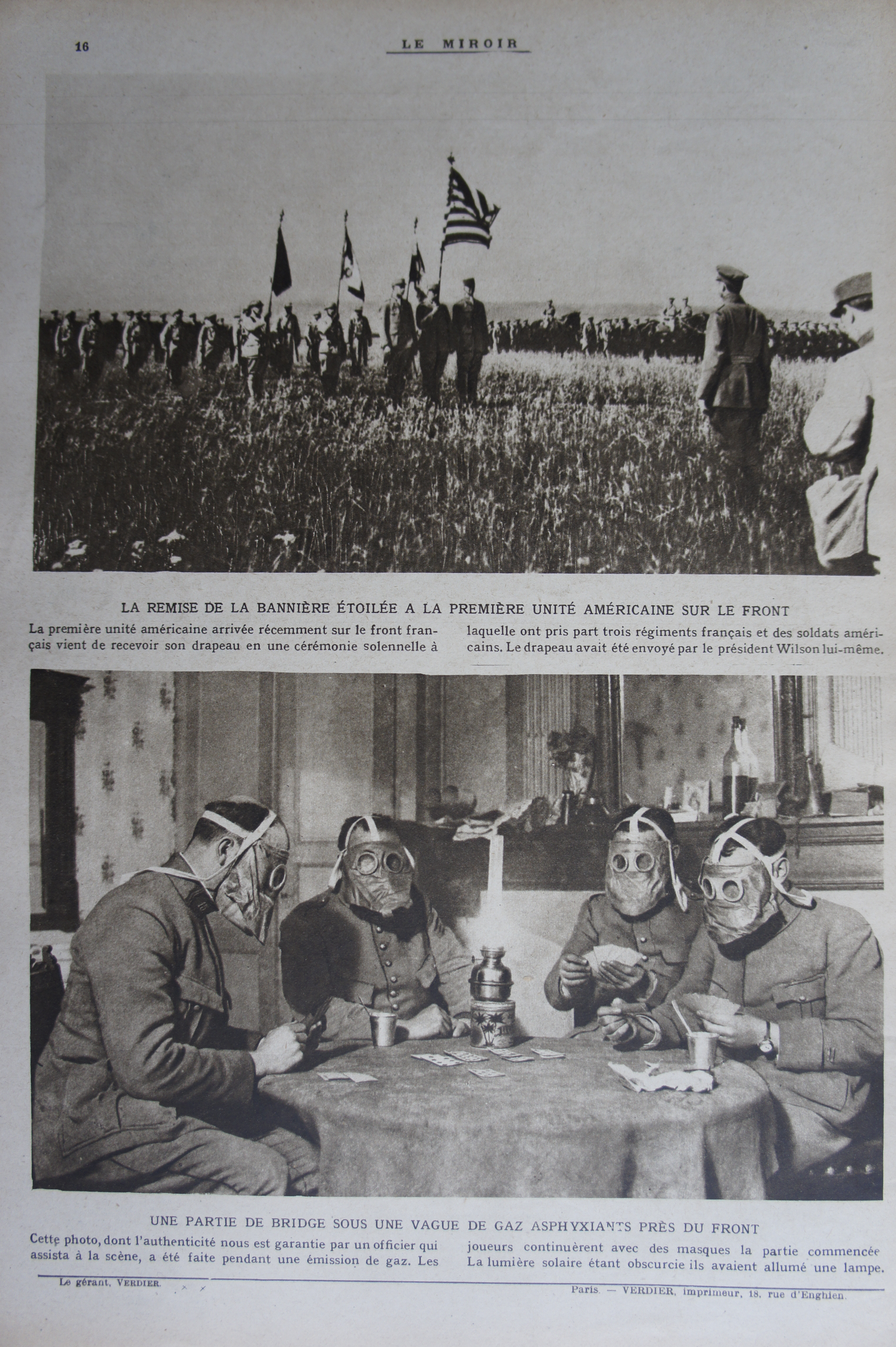 extrait du journal "le miroir".